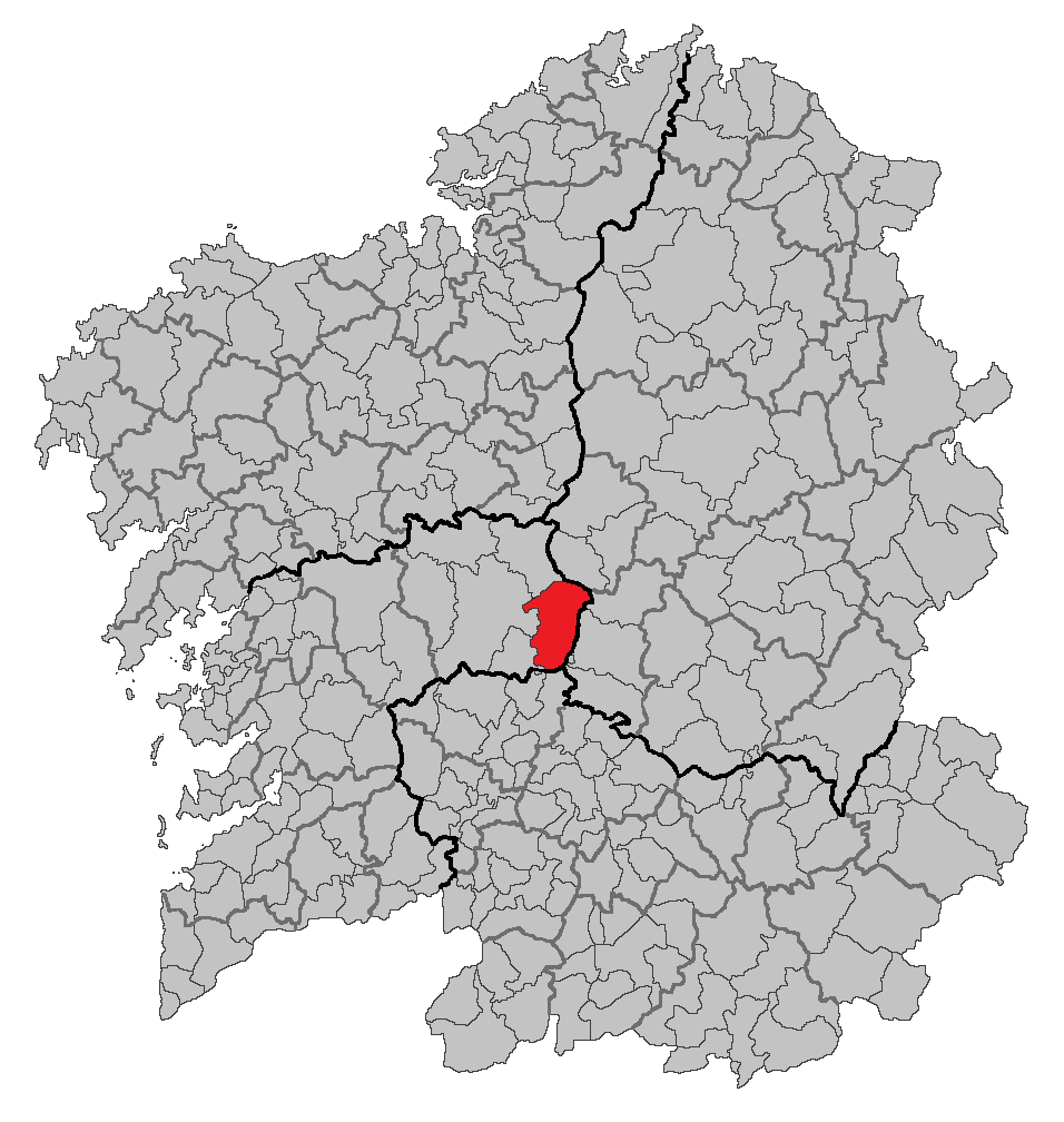 Mapa coa localización do concello de Rodeiro.